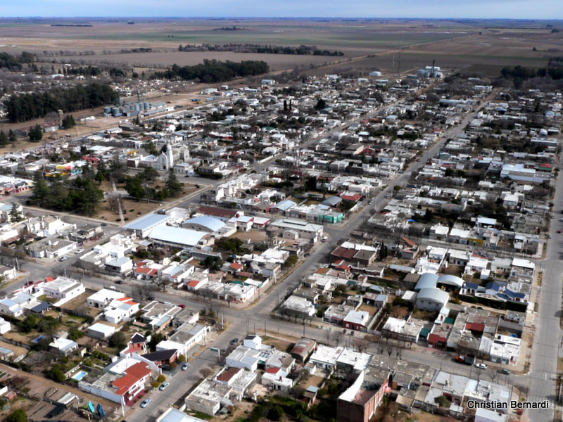 Foto aérea de Ucacha